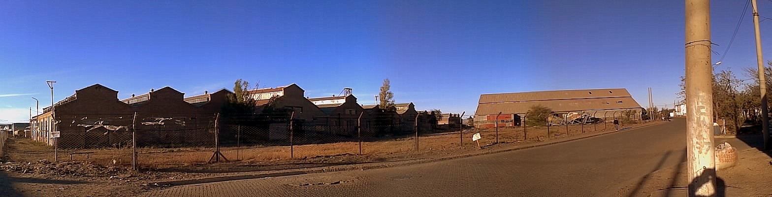 Estación Conferpet, dodne ayer arribaron los trenes del ferrocarril y de esta empresa